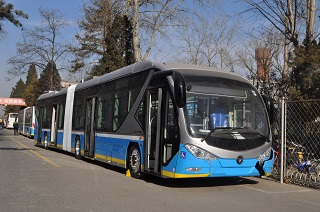 即将上路的快速公交2号线双源无轨电车